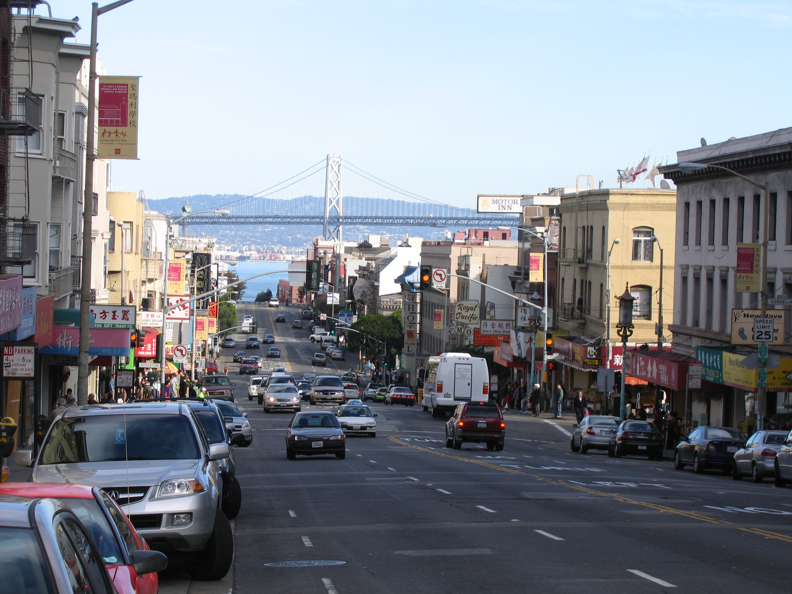 Гледка наизток по ул. "Бродуей" в Сан Франциско към моста Сан Франциско-Оукланд.